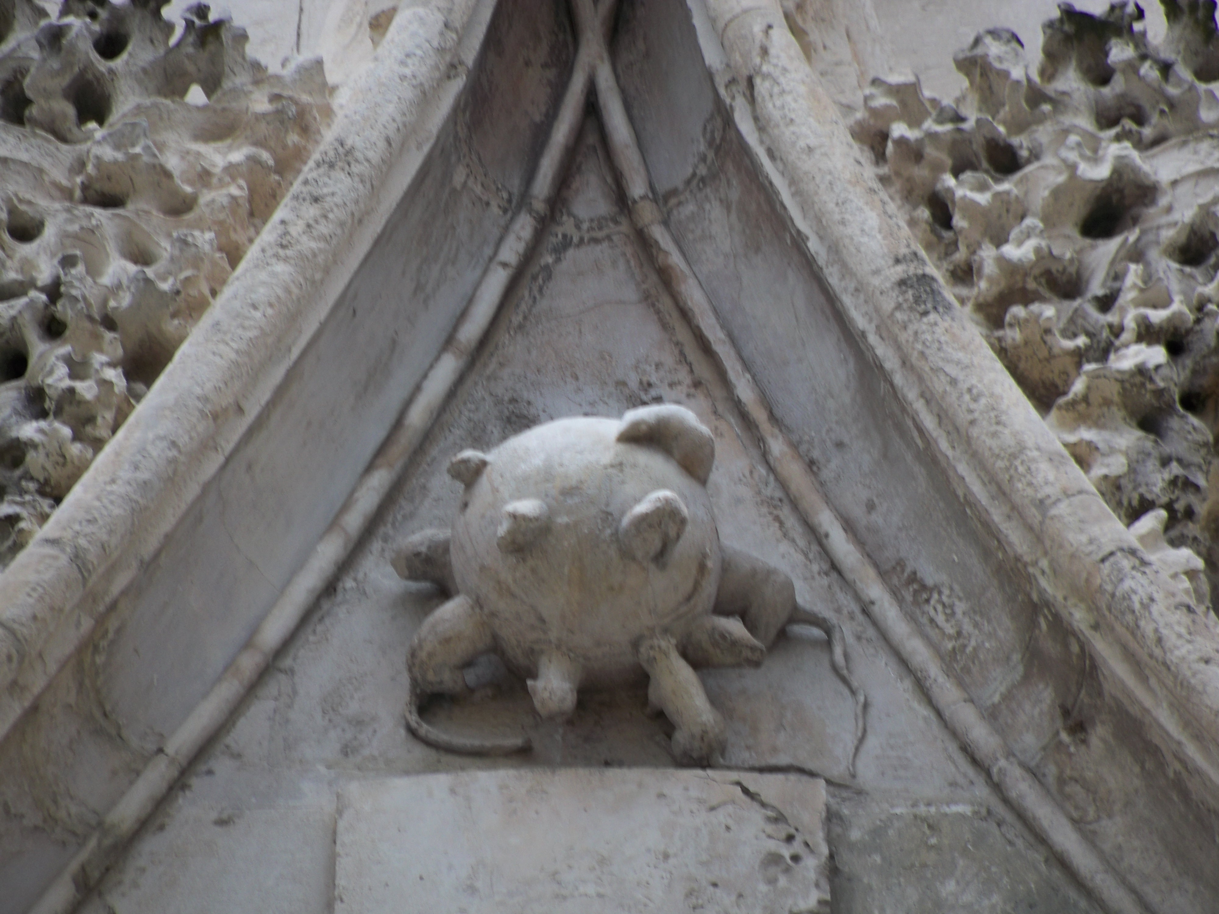 Cathédrale Saint Siffrein de Carpentras (84)